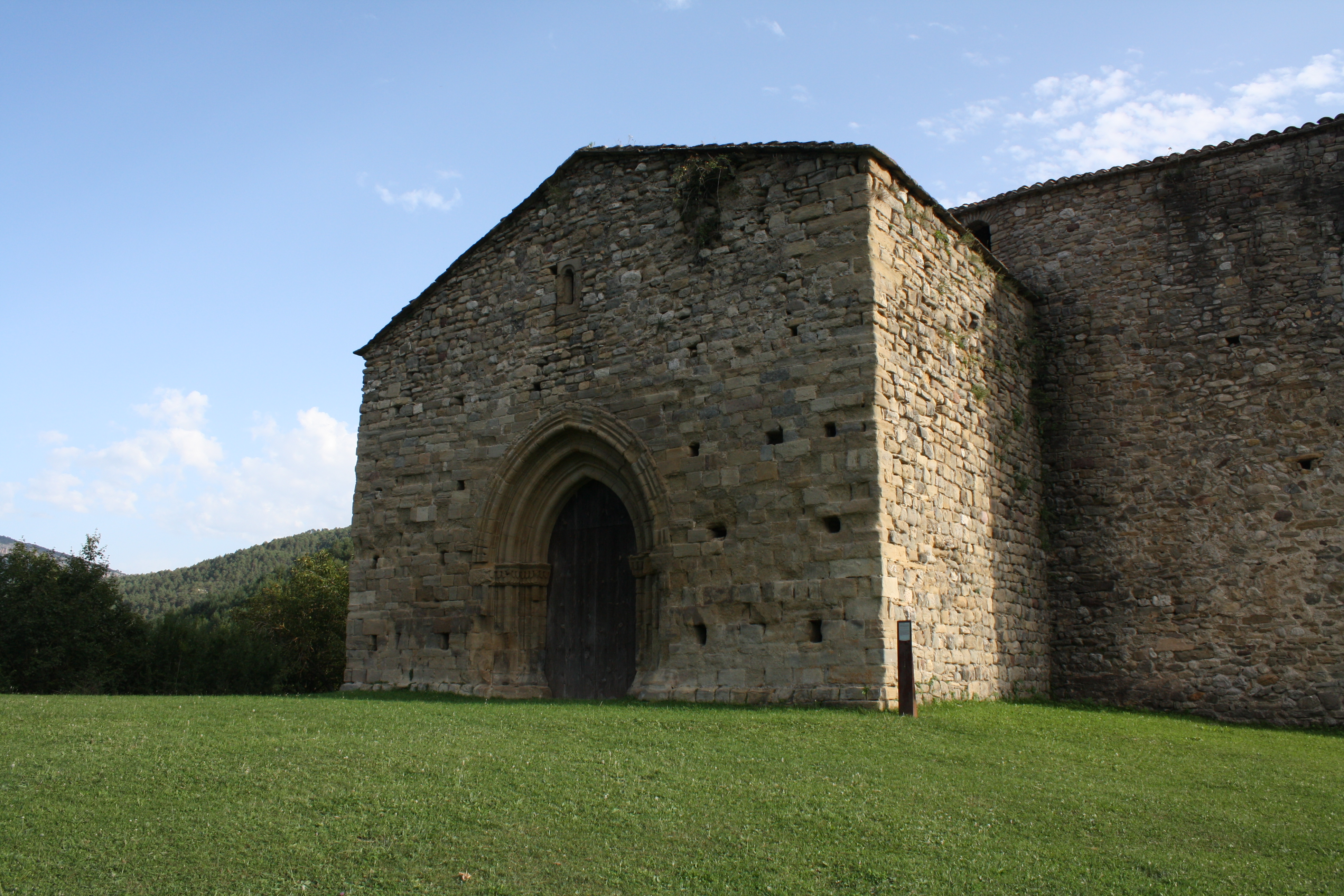 Detall de l'entrada principal del monestir de Santa Maria de Lillet (s. XII, XIV, XVIII)